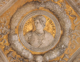 detail: Emperor Otho}